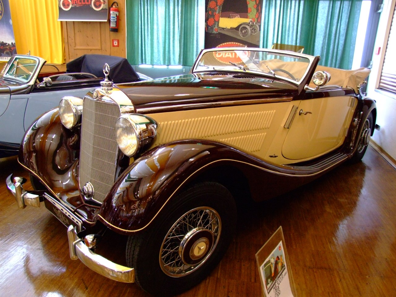 MercedesB 320A 3200ccm78PS 1938